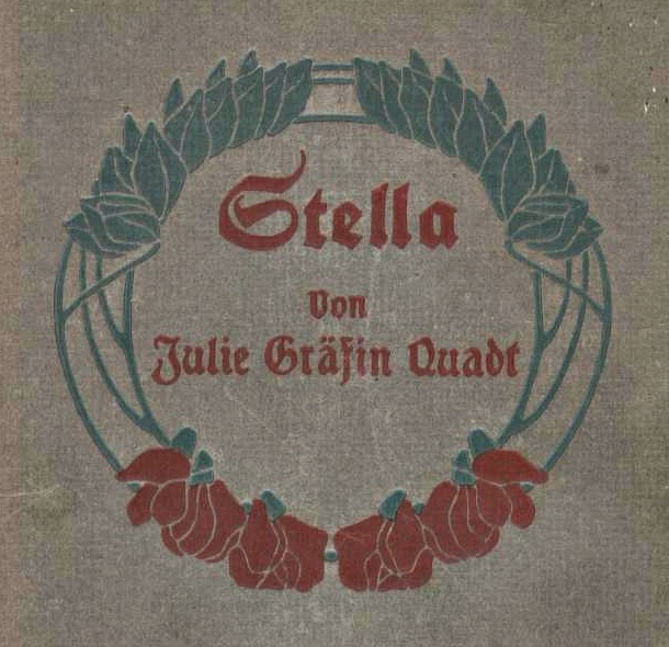 Buchtitel Gräfin Julie von Quadt (1859-1925), Buch von 1902